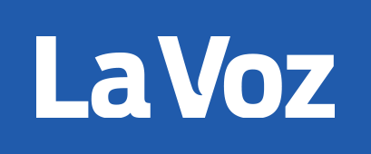 La Voz del Interior logo